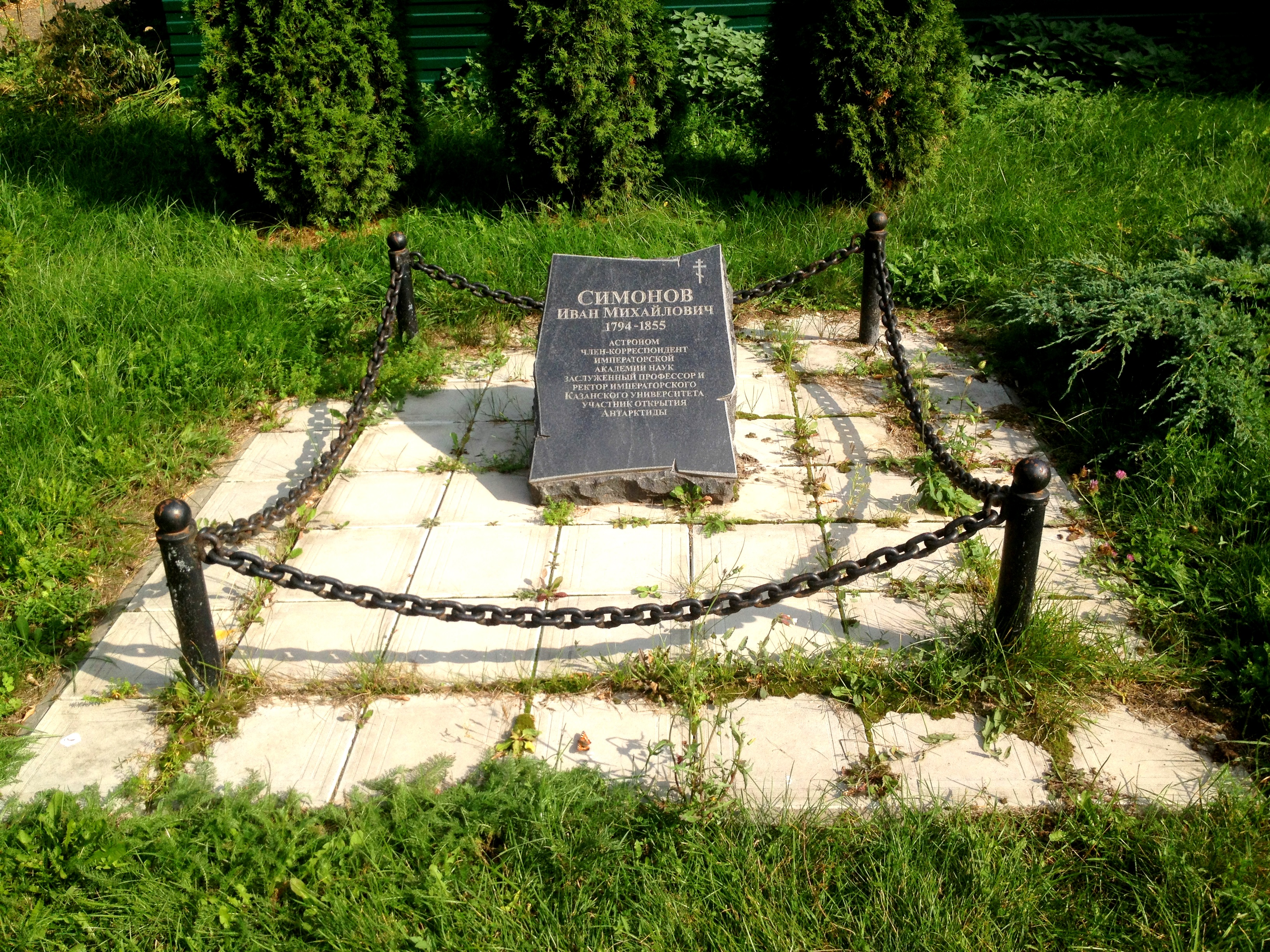 Монастырь Кизический: улица Декабристов, 98, Казань, Татарстан